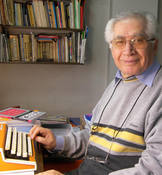 Huseyin Kilickan, atolyesinde